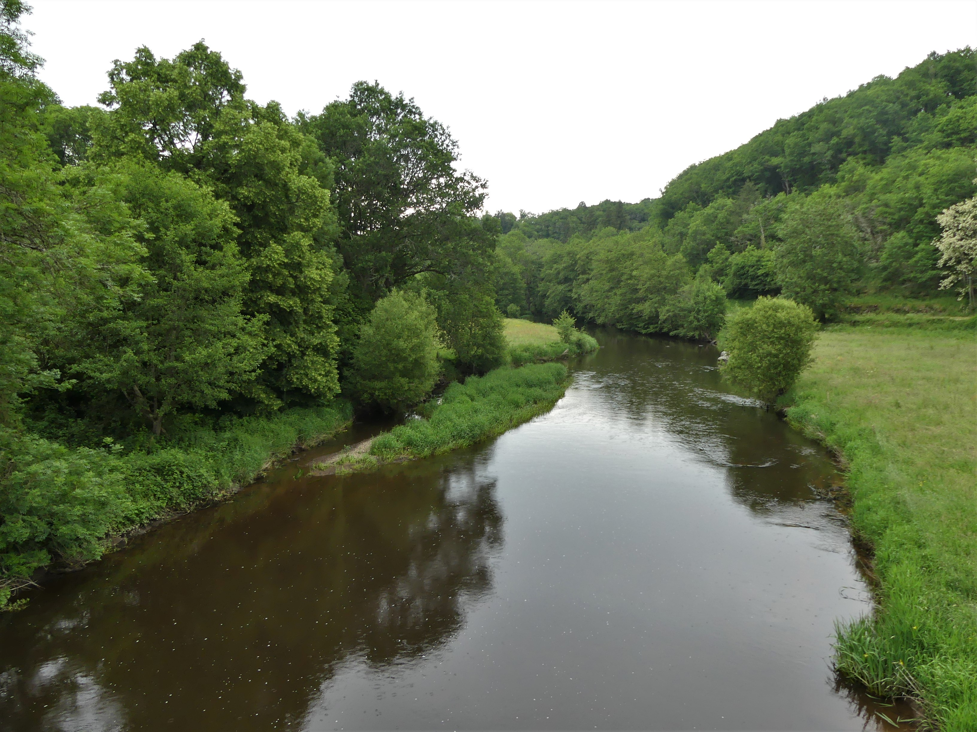 La Creuse au pont de la route départementale 7 à la Rochette, Saint-Médard-la-Rochette, Creuse, France. Vue prise en direction de l'aval.